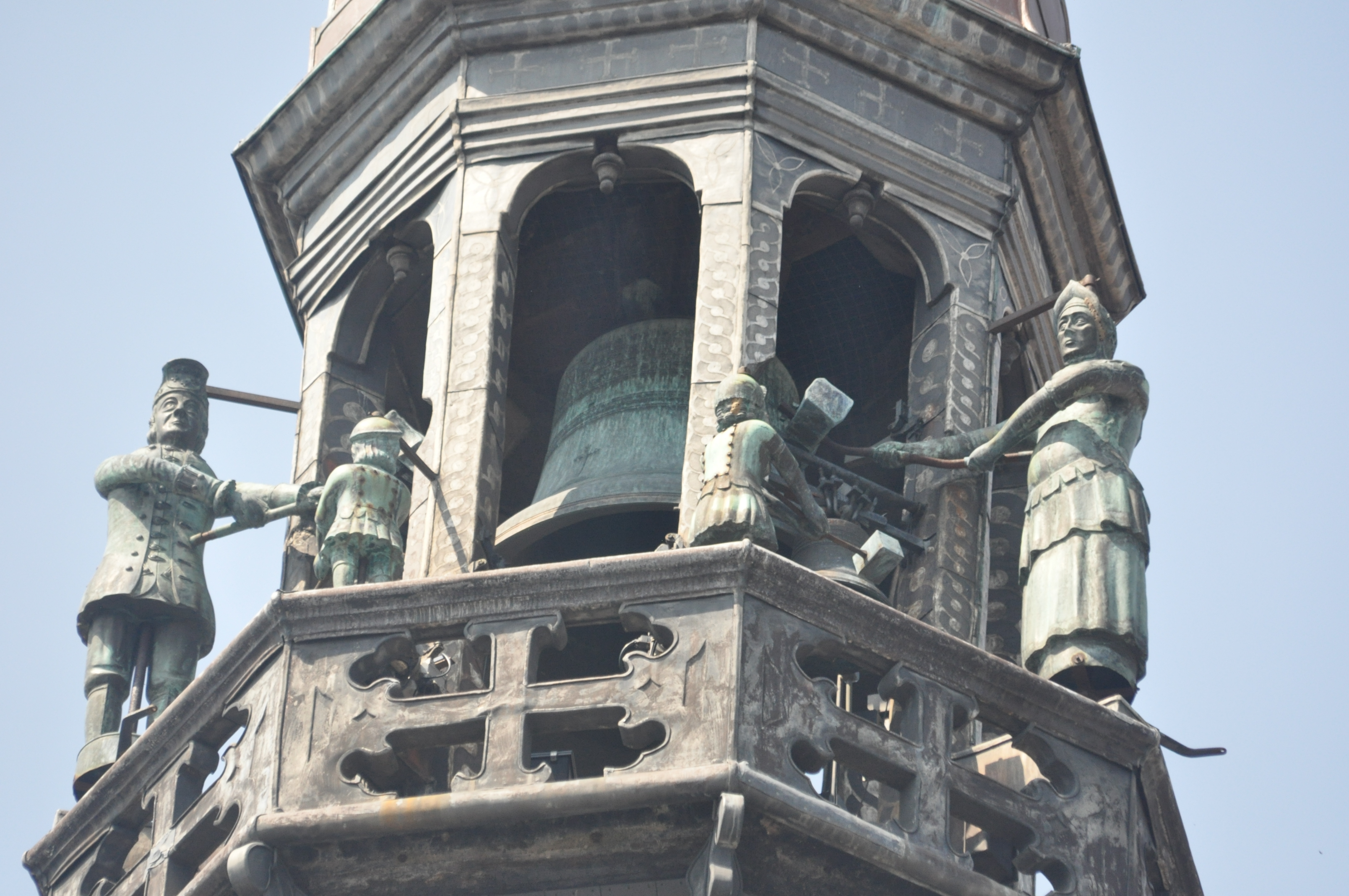 Le Jacquemart sonne midi.